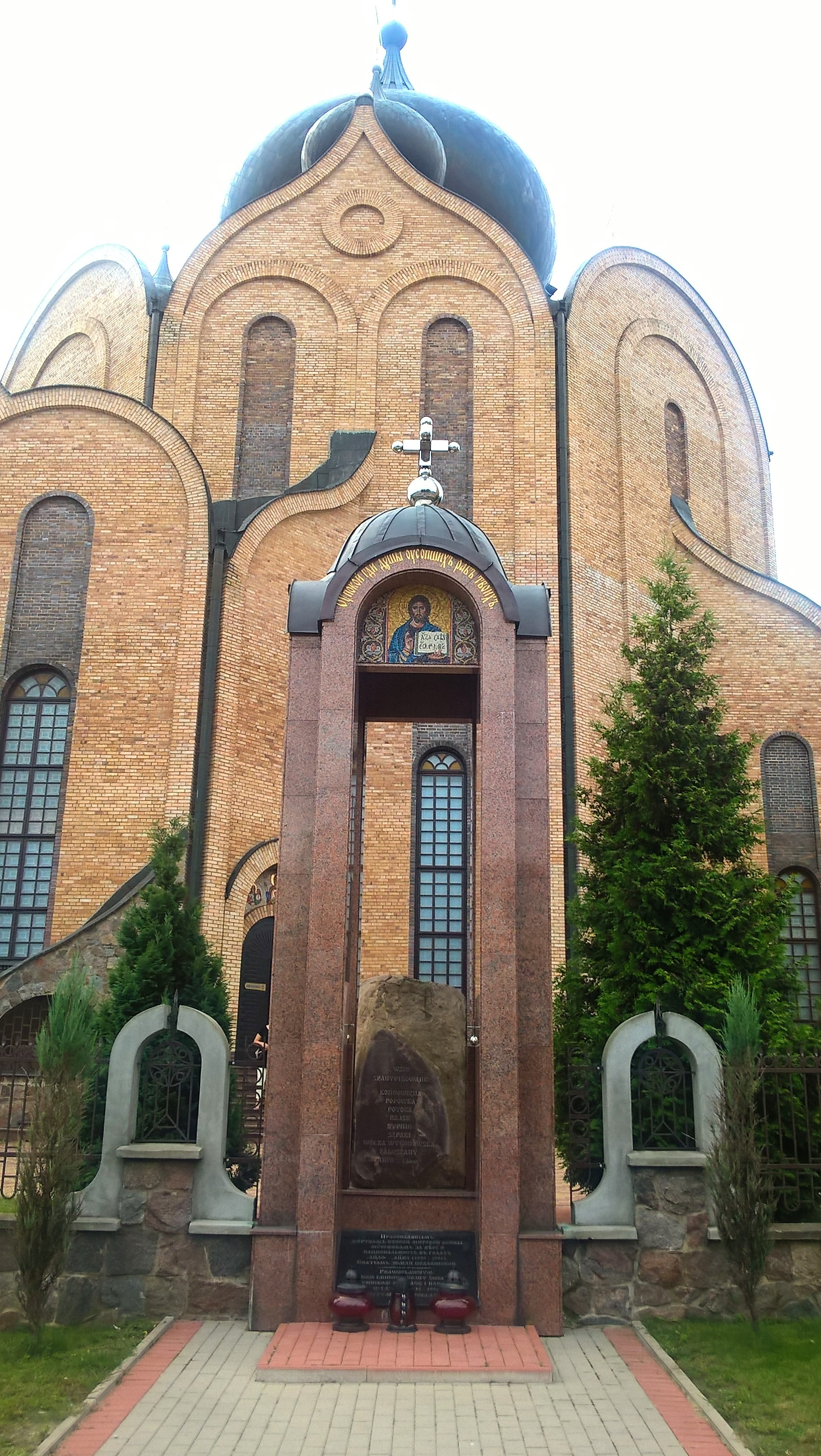 Pomnik prawosławnych mieszkańców Białostocczyzny zabitych i zaginionych w latach 1939–1956